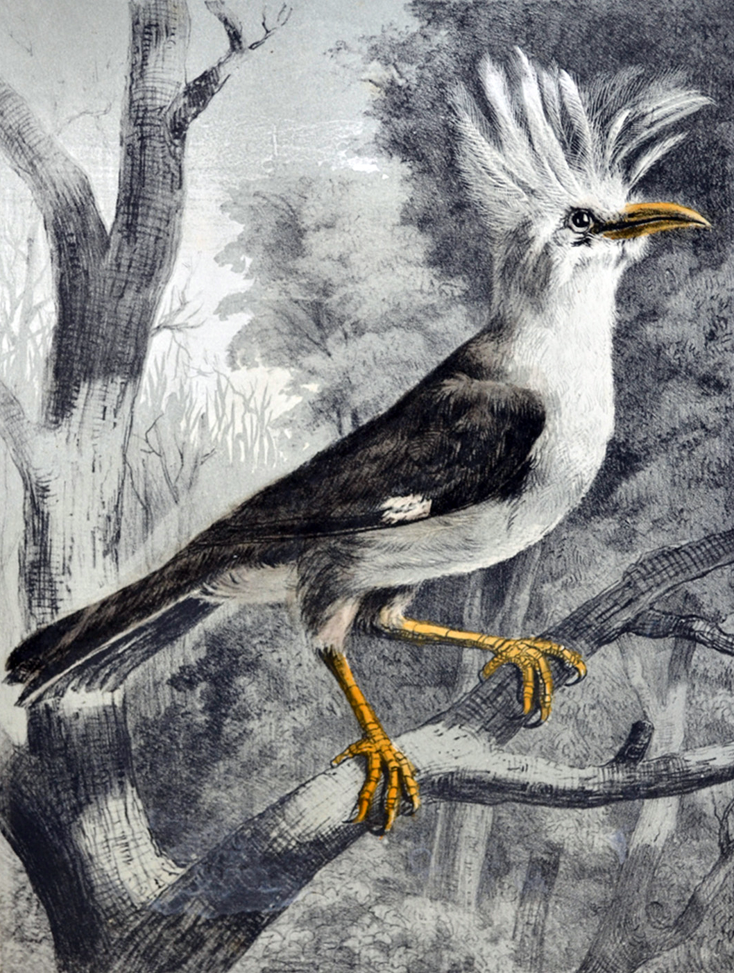 Hoopoe starling, "Huppe de Bourbon".